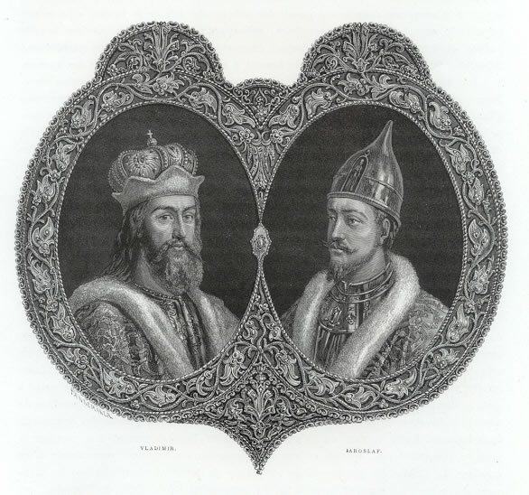 Book Illustration from the "Voyages and travels, or, Scenes in many lands : with eight hundred and fifty illustrations on wood and steel of views from all parts of the world, comprising mountains, lakes, rivers, palaces, cathedrals, castles, abbeys, and ruins, with original descriptions by the best authors". Edited by Leo de Colange. — Boston E. W. Walkers & Co, 1887. "VLADIMIR I - c.950 - 1015 Russian Ruler Saint Vladimir I created a united Russian state and introduced Christianity as a state religion. Vladimir, son of the prince of Kiev, became ruler of Kiev and Novgorod. He consolidated the Russian lands from the Ukraine to the Baltic. Vladimir aided the Byzantine emperor to fight a rebellion in exchange for the emperor's sister in marriage. He also consented to become a Christian, after which he ordered the Christian conversion of Kiev and Novgorod. JARASLAV - 1019-1054. Ruler of Gårdarike (present Russia), resided in Koenugård (Kiev) and Holmgård (Hólmgardr, Novgorod). Jaroslav was the son of Vladimir the Great. After lengthy struggles about the throne against his brothers he came into possession of the throne in Kiev and became accepted as king of the largest part of Russia. He had lively relations with several royal houses in Scandinavia and in other countries. He got married with Ingegärd, the daughter of the Swedish king Olof Skötkonung. Jaroslav´s oldest daughter Elisavjeta (Ellisiv), was married to the Norwegian king Harald Hardrádi".